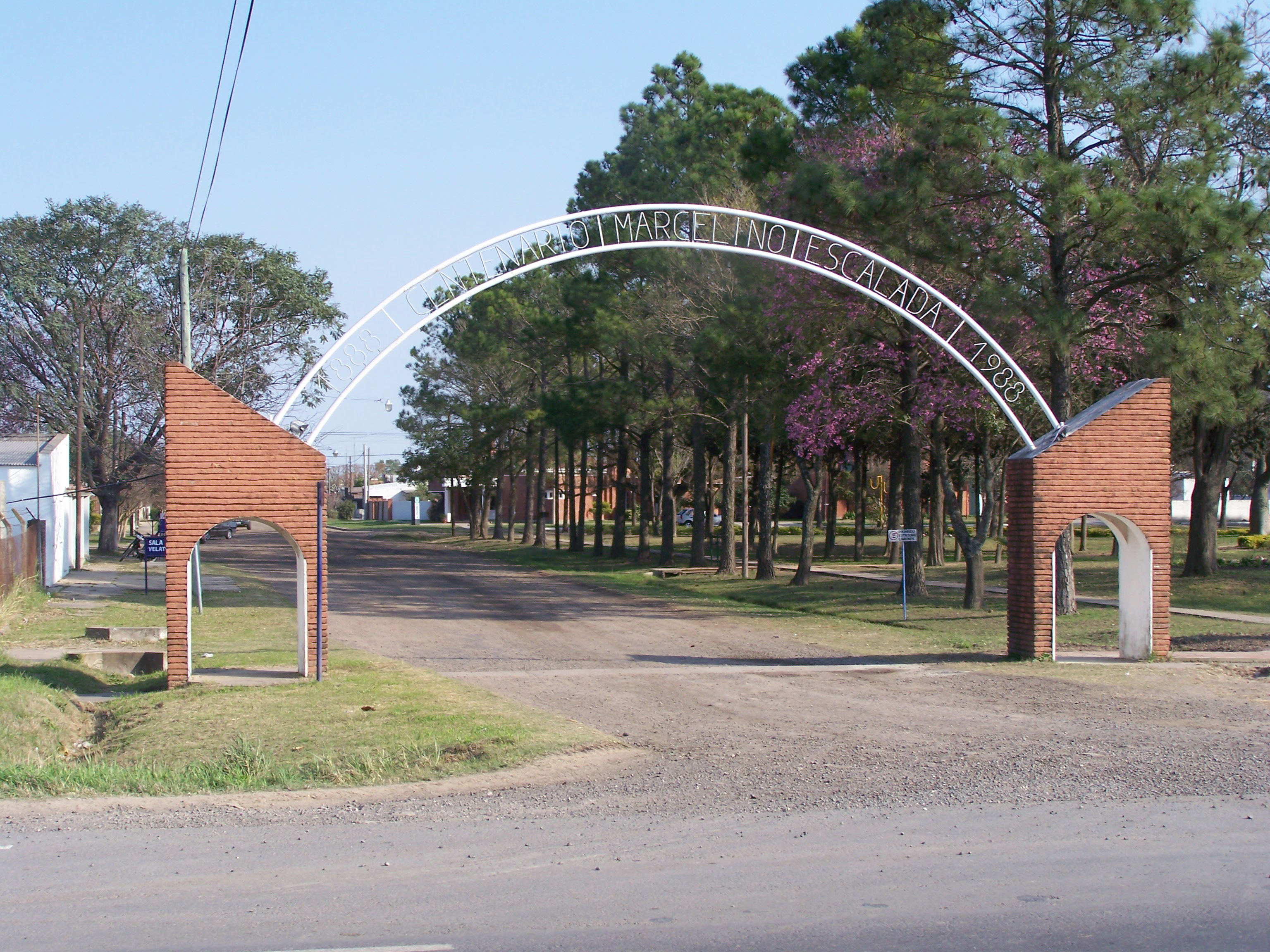 Arco innaugurado al cumplirse el primer centenario de la fundacíon de pueblo.